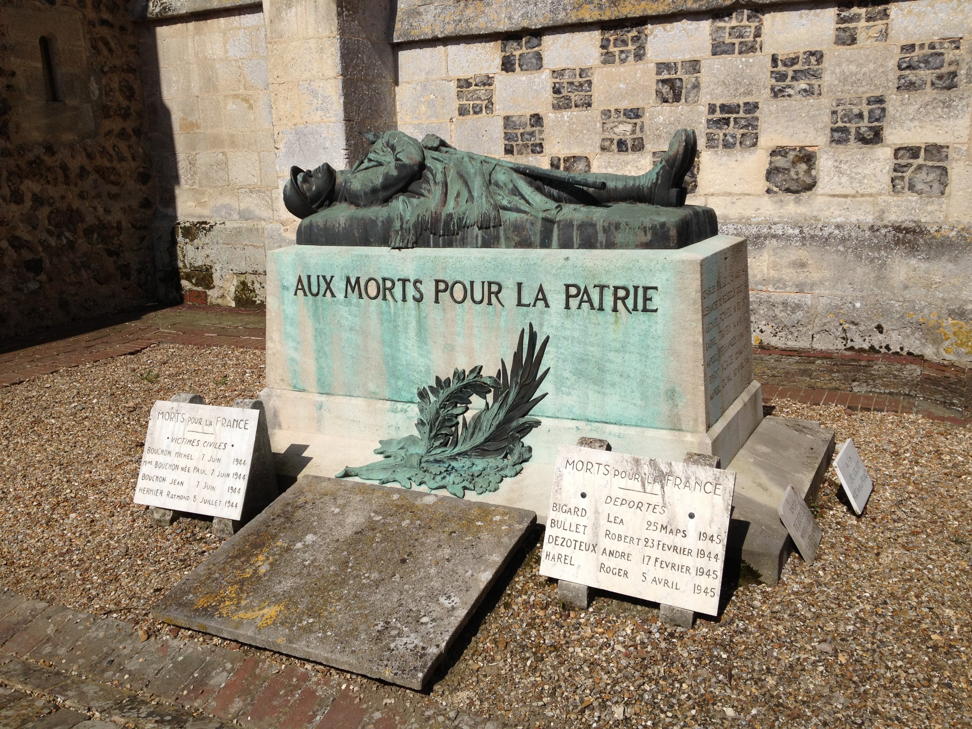 Monument aux morts - gisant de Fontaine-la-Sorêt.